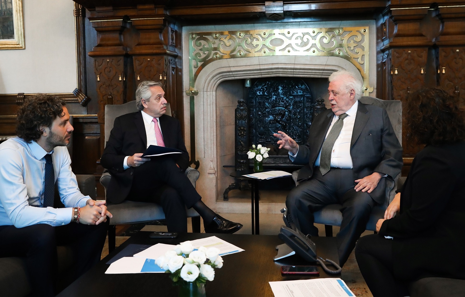 El presidente Alberto Fernández se reunió esta mañana en Casa Rosada con el titular de la cartera sanitaria nacional, Ginés González García, quien le expuso un informe de situación acerca de la información epidemiológica existente a nivel mundial sobre el Coronavirus, que ya afecta a once países en el mundo. Del encuentro también participaron el jefe de Gabinete, Santiago Cafiero, y la secretaria de Acceso a la Salud, Carla Vizzotti.